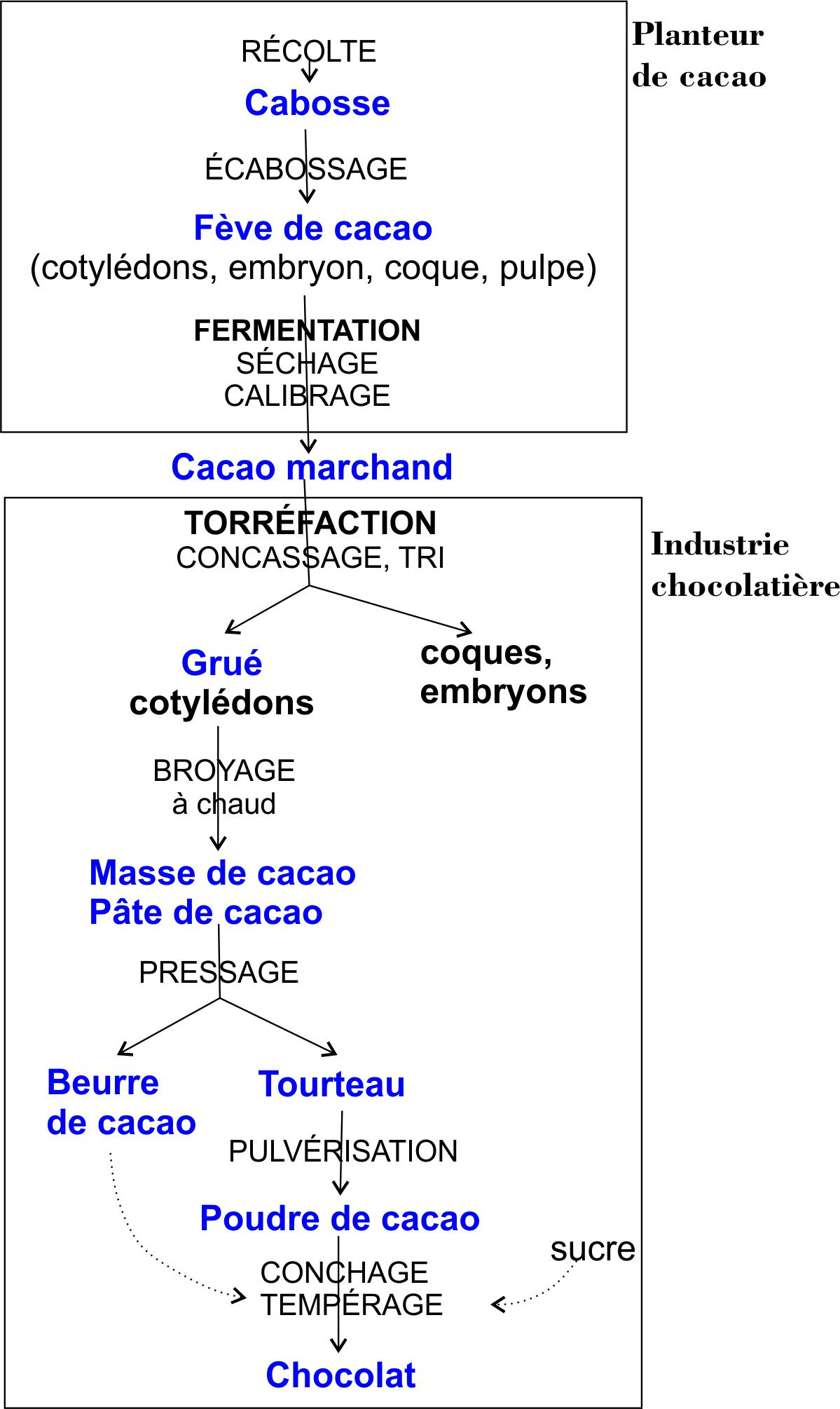 Les planteurs de cacao effectuent les étapes de traitement suivantes : récolte, écabossage, fermentation séchage, calibrage. L'industrie chocolatière achète la cacao marchand et effectue la torréfaction, le concassage, tri, broyage à chaud, pressage de la masse de cacao, pulvérisation des tourteaux donnant la poudre de cacao.